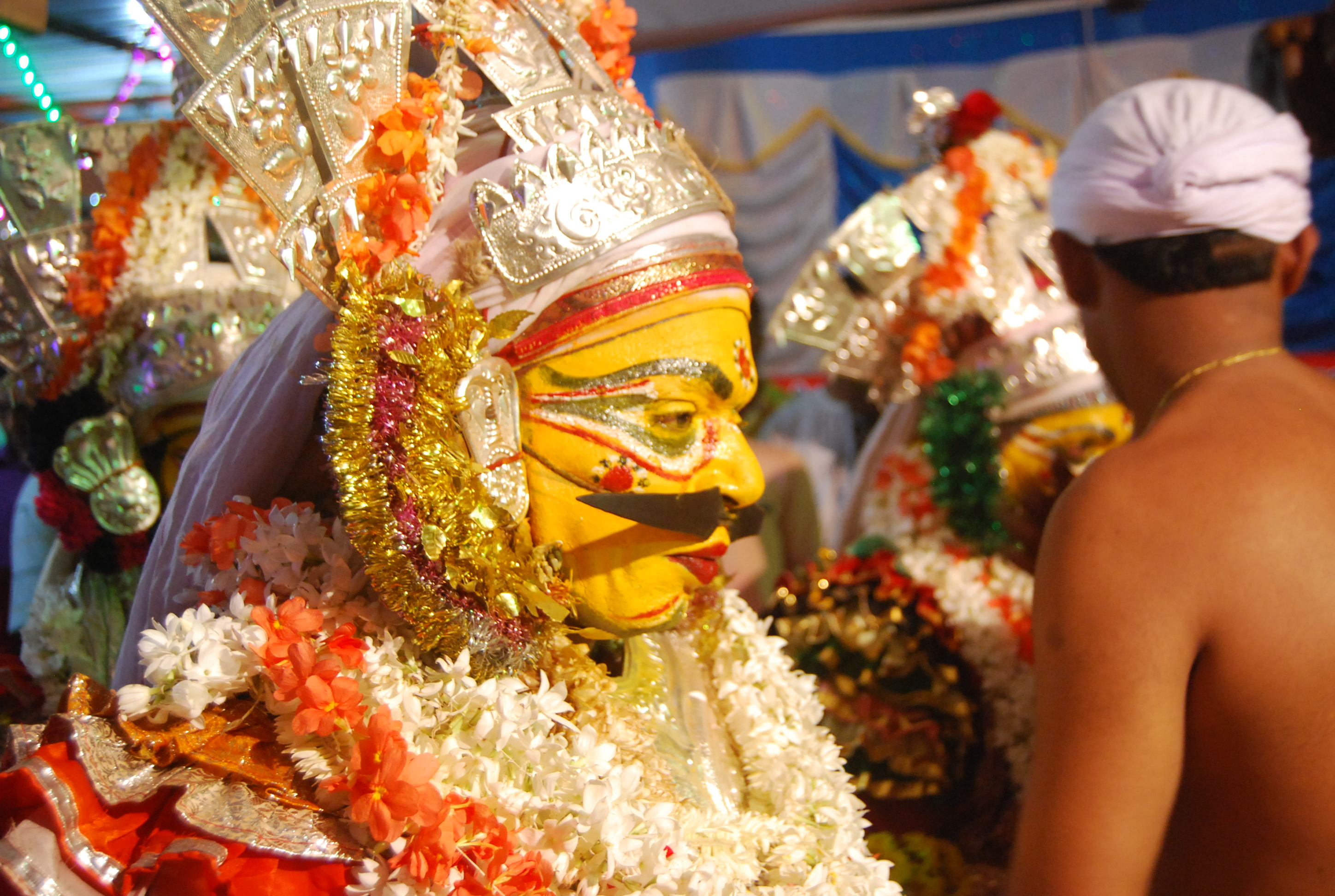 ಕನ್ನಡ: ಕೋಟಿ ಚೆನ್ನಯ ಕನ್ನಡ: Koti Chennaya